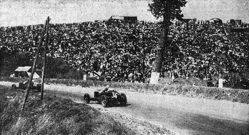 René Dreyfus, futur vainqueur, à la poursuite de Louis Chrion, Grand Prix de Dieppe 1935 (dans les S de Saint-Aubin).